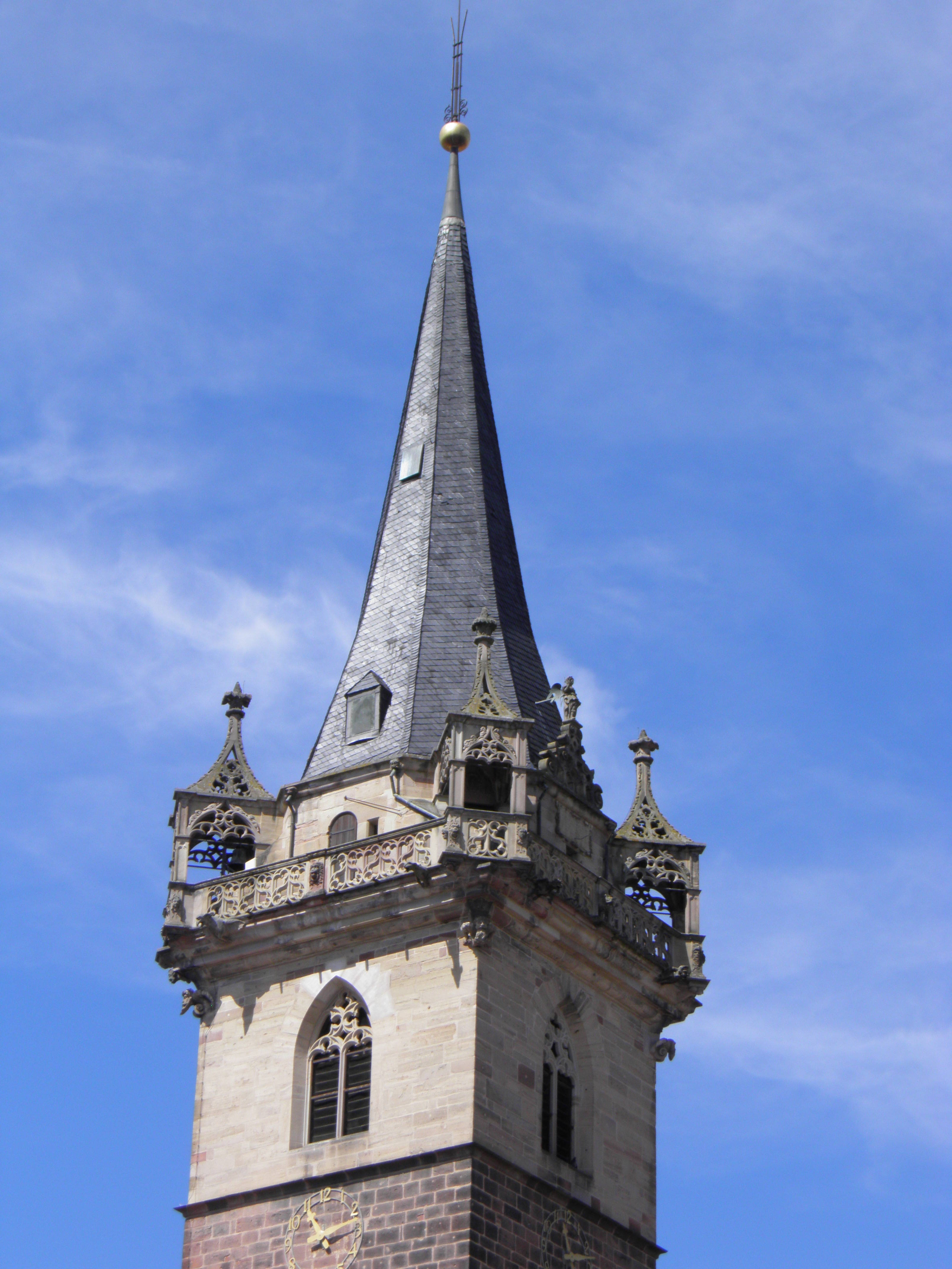 Sommet du Kapellturm à Obernai (Bas-Rhin, France).